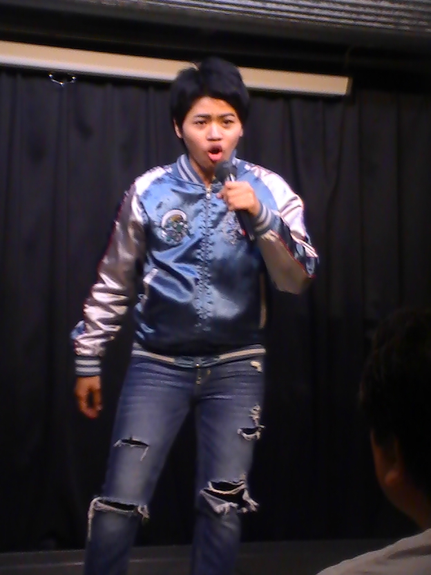 ハリウリサ (2017年4月)